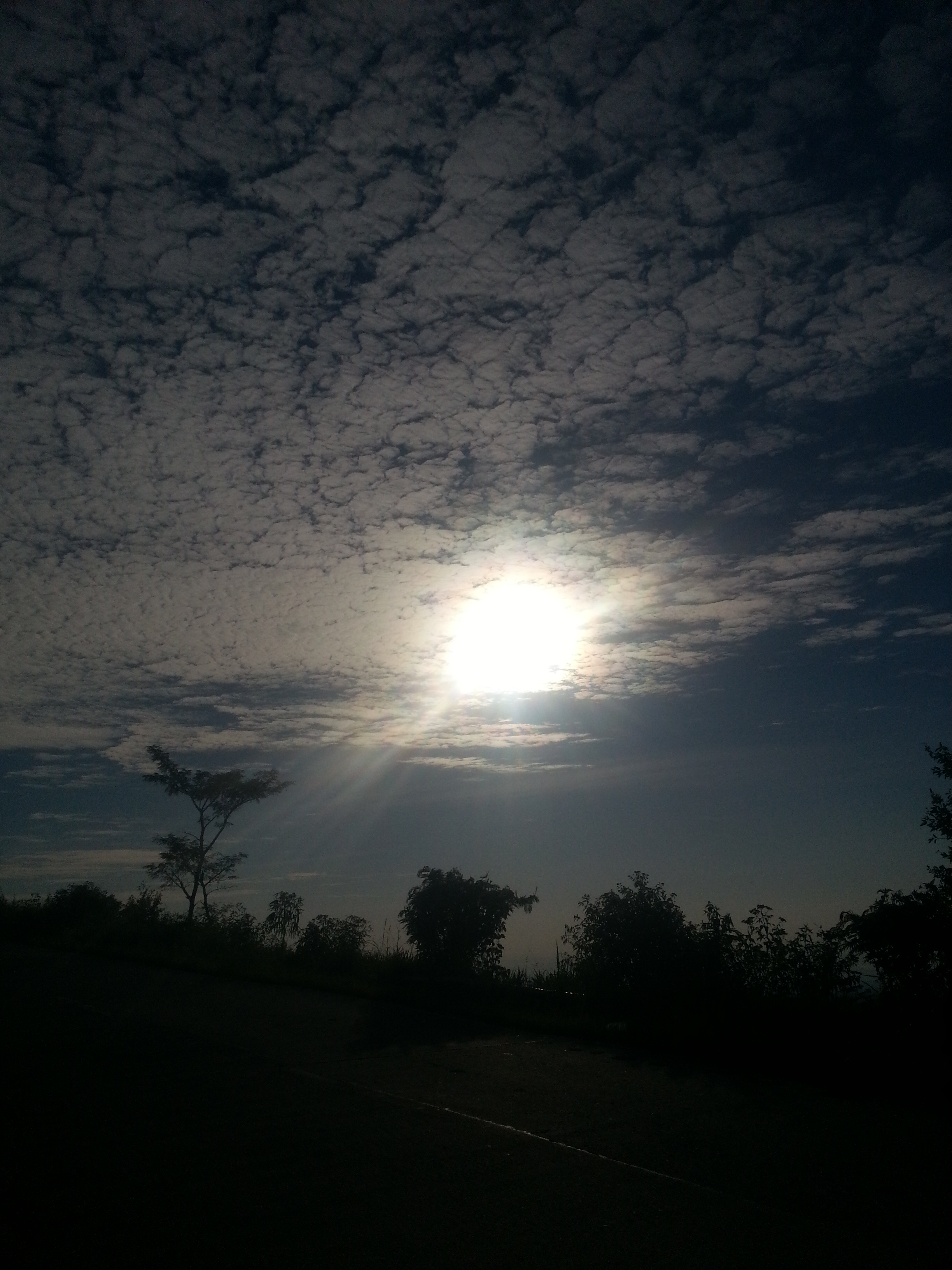 Basa Jawa: Srengéngé ing wayah ésuk iku sinawang katon éndah anambahi éndahing sesawangan ana ing awang-awanging désa Selo.